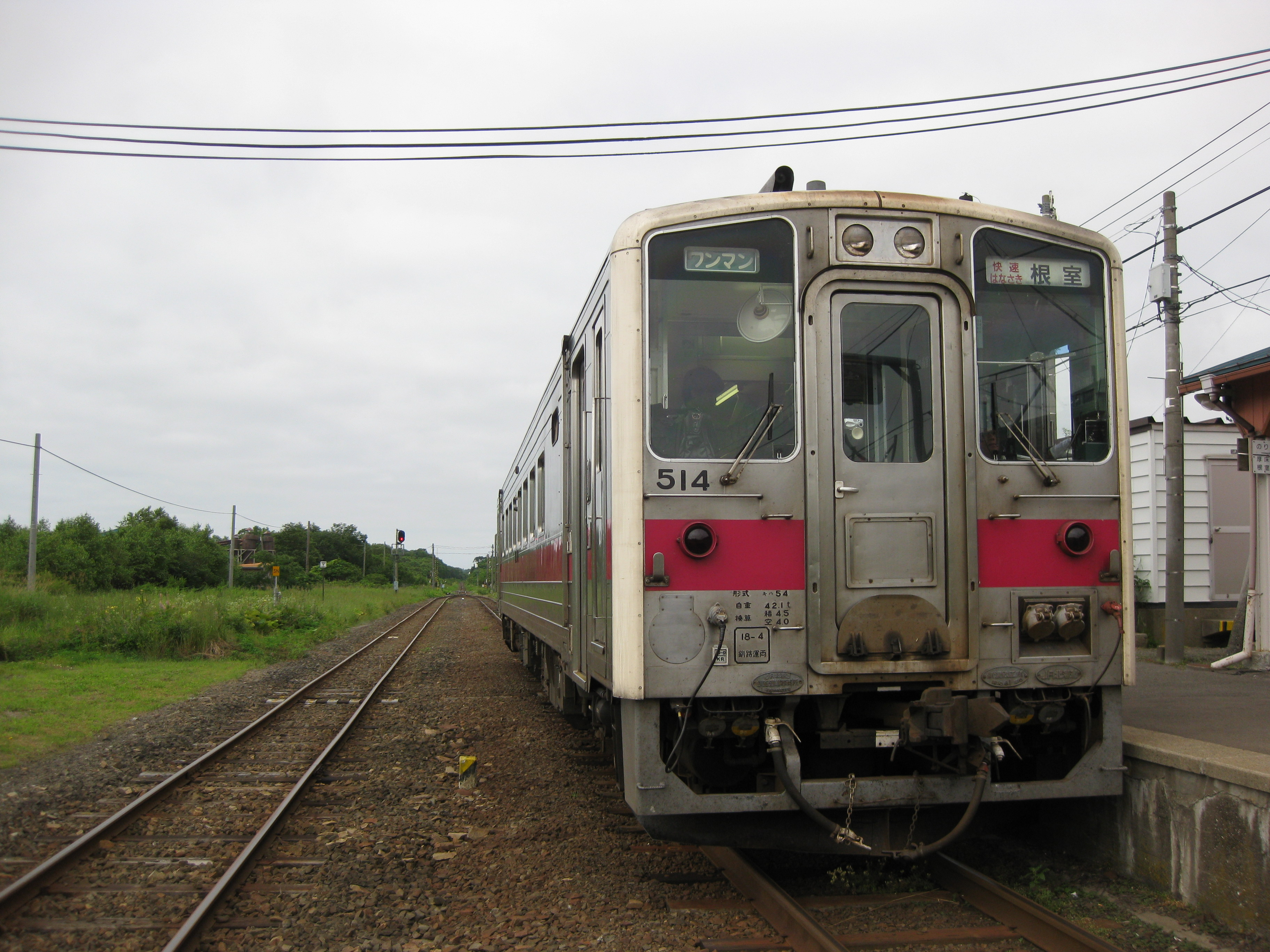 快速「はなさき」。茶内駅にて